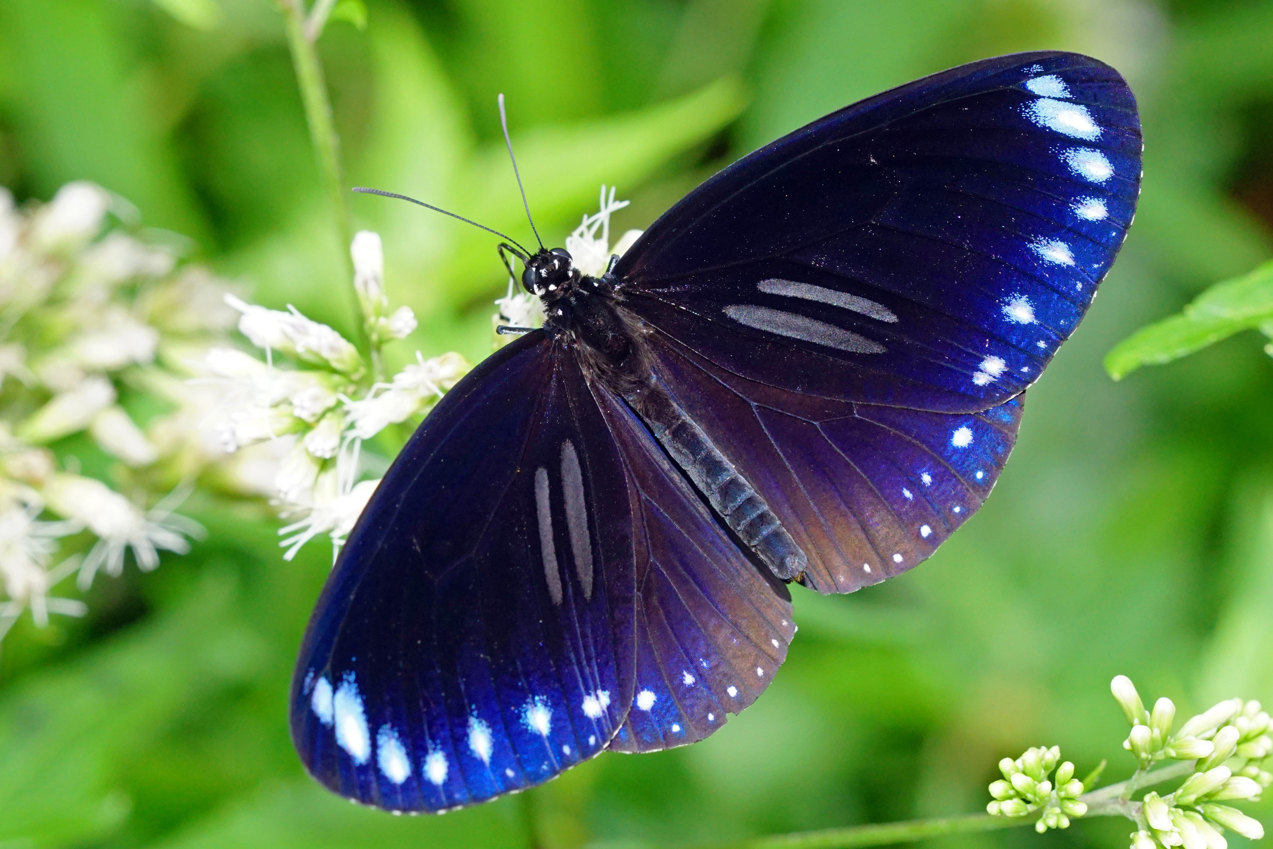 雙標紫斑蝶 Euploea sylvester swinhoei